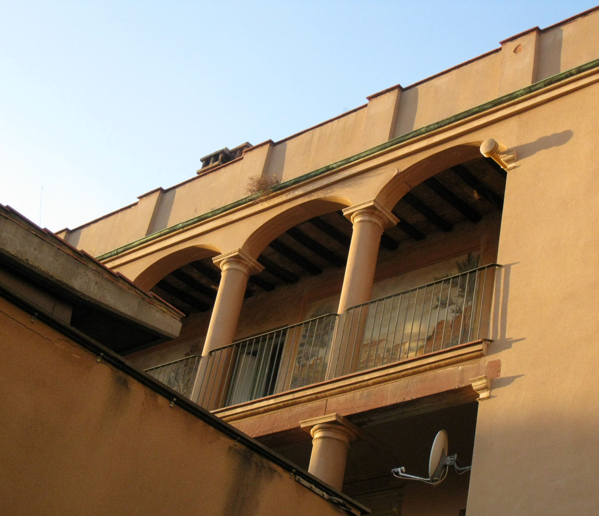 Casa Mata, al carrer de Garcia Humet núm. 21 (Terrassa). Edifici de mitjan segle XIX. Vista del pis superior de la galeria lateral porticada, amb plafons murals del pintor Cascante.